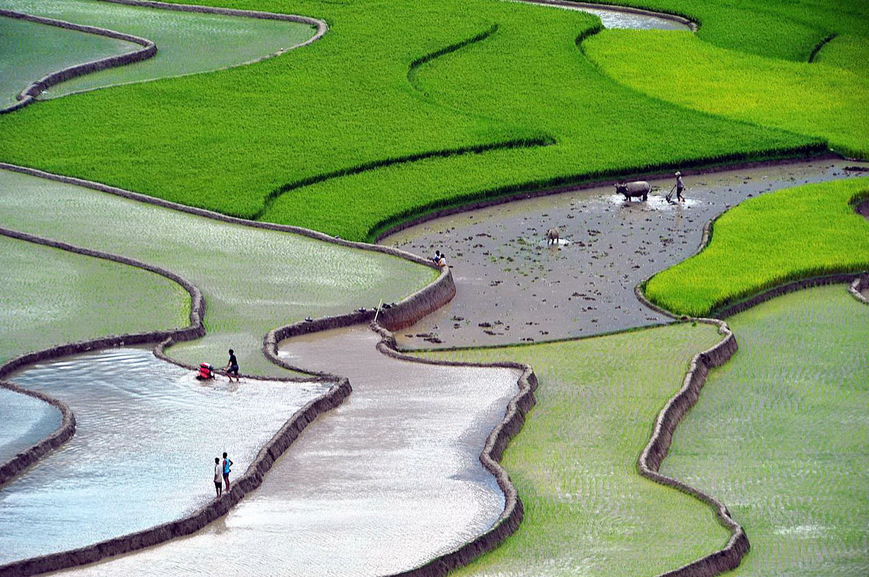 WAVES